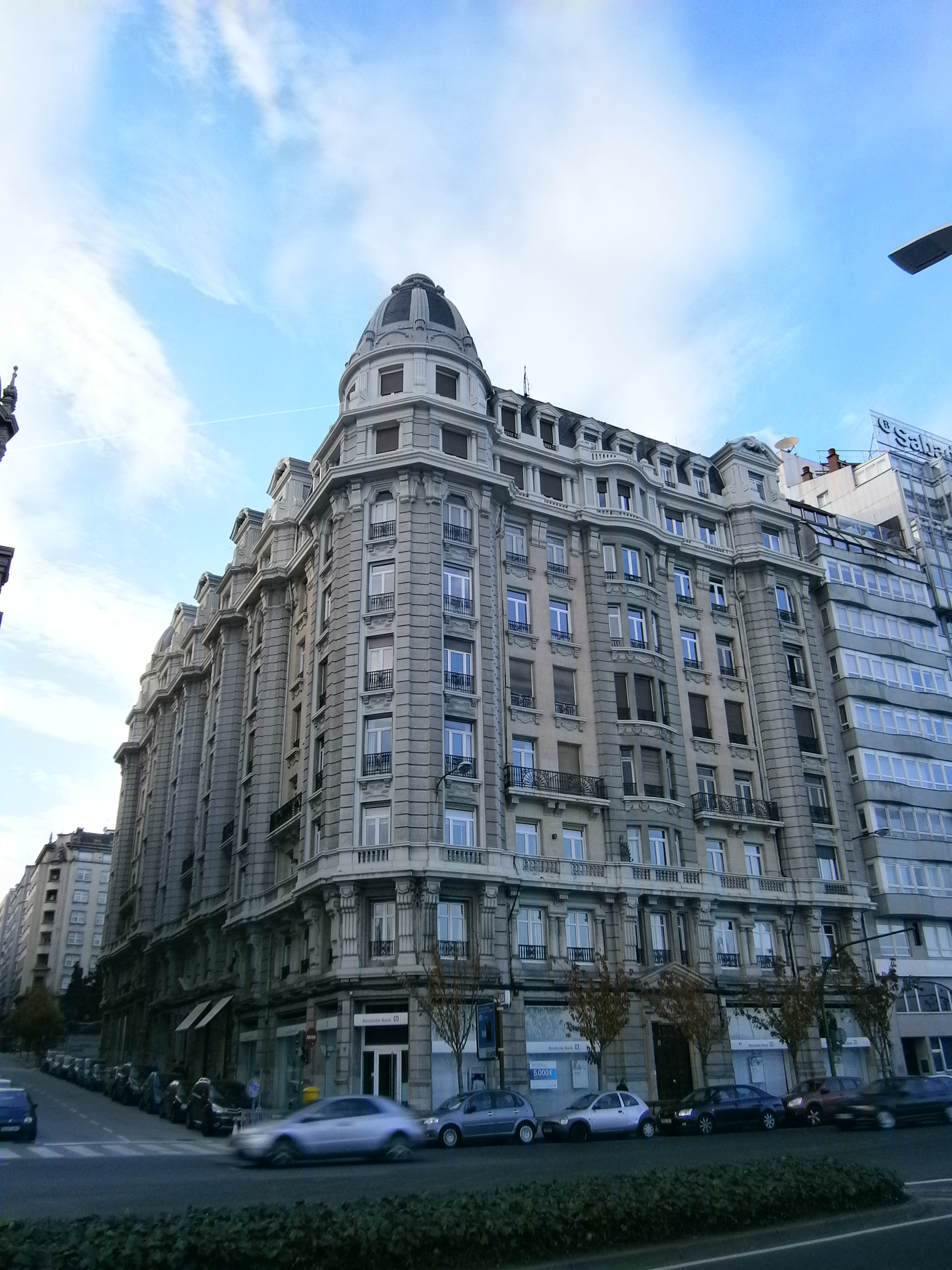 Casa Barrié, de Antonio Tenreiro e Peregrín Estellés na Coruña